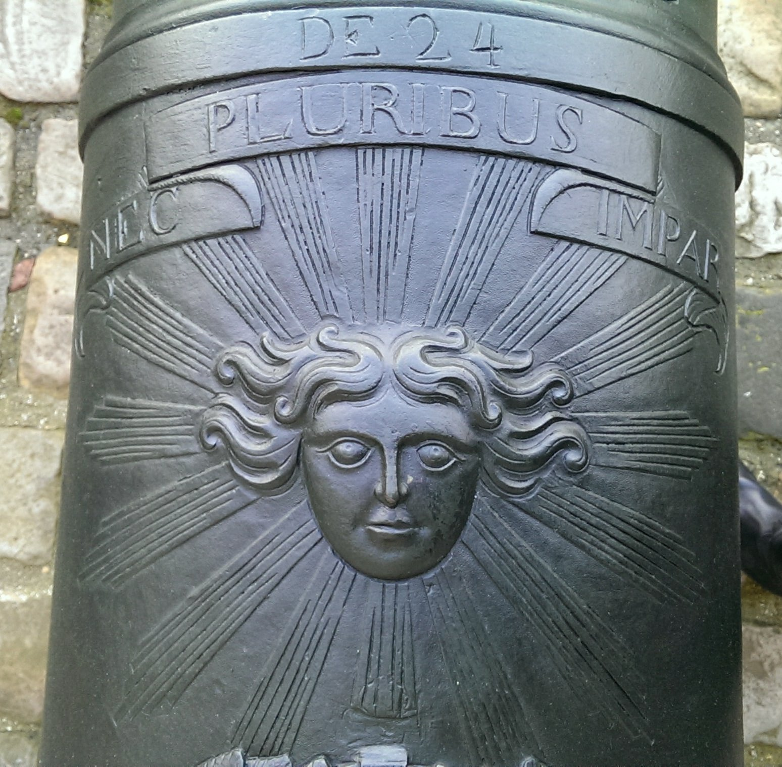 Prise sur un des canon dans la cours des Invalides à Paris.